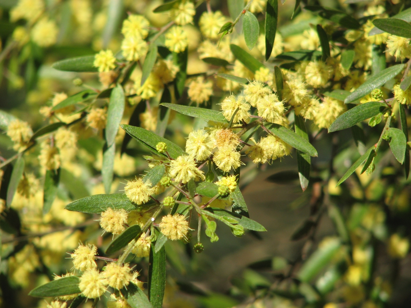 Acacia verniciflua (cultivated, labelled), Maranoa Gardens, Balwyn, Victoria, Australia